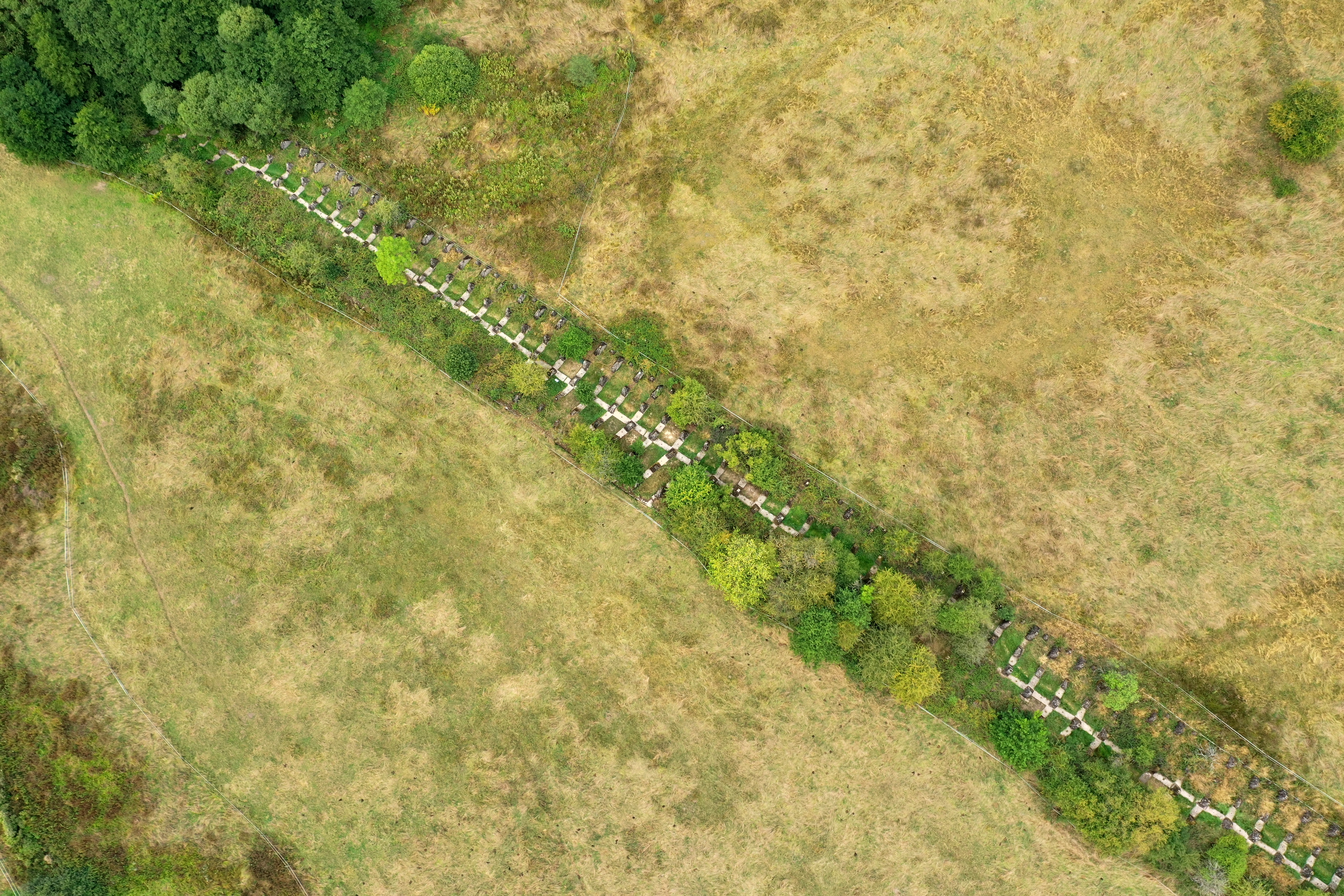 Luftbild Panzersperre und Höckerlinienpfad zwischen Orscholz und Oberleuken.